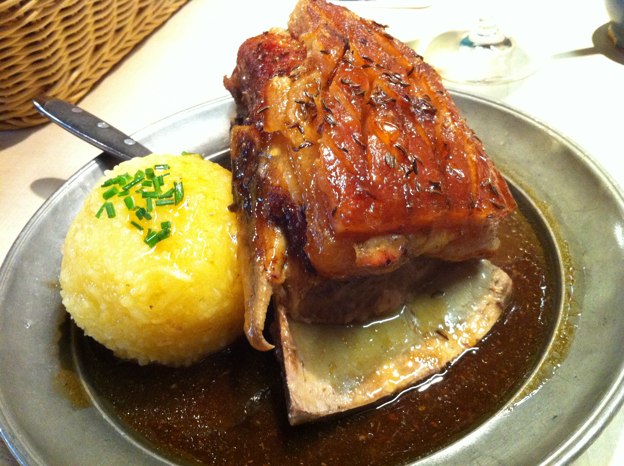 Schäufele with raspeball